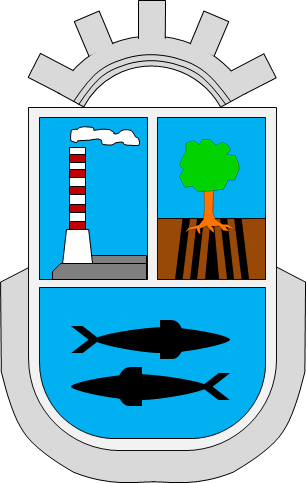 Escudo de la comuna de Puchuncaví (Chile)